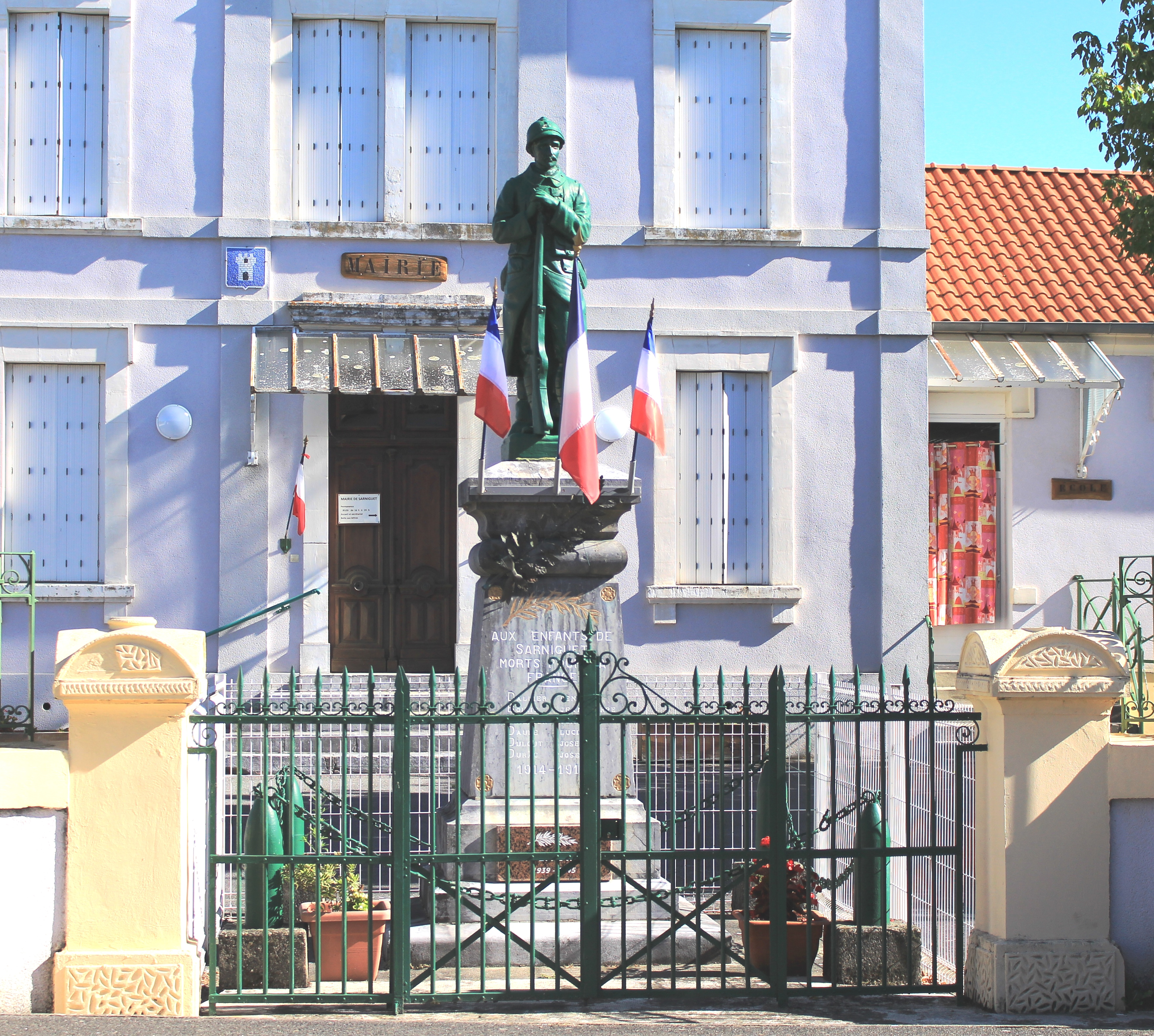 Monument aux morts de Sarniguet (Hautes-Pyrénées)